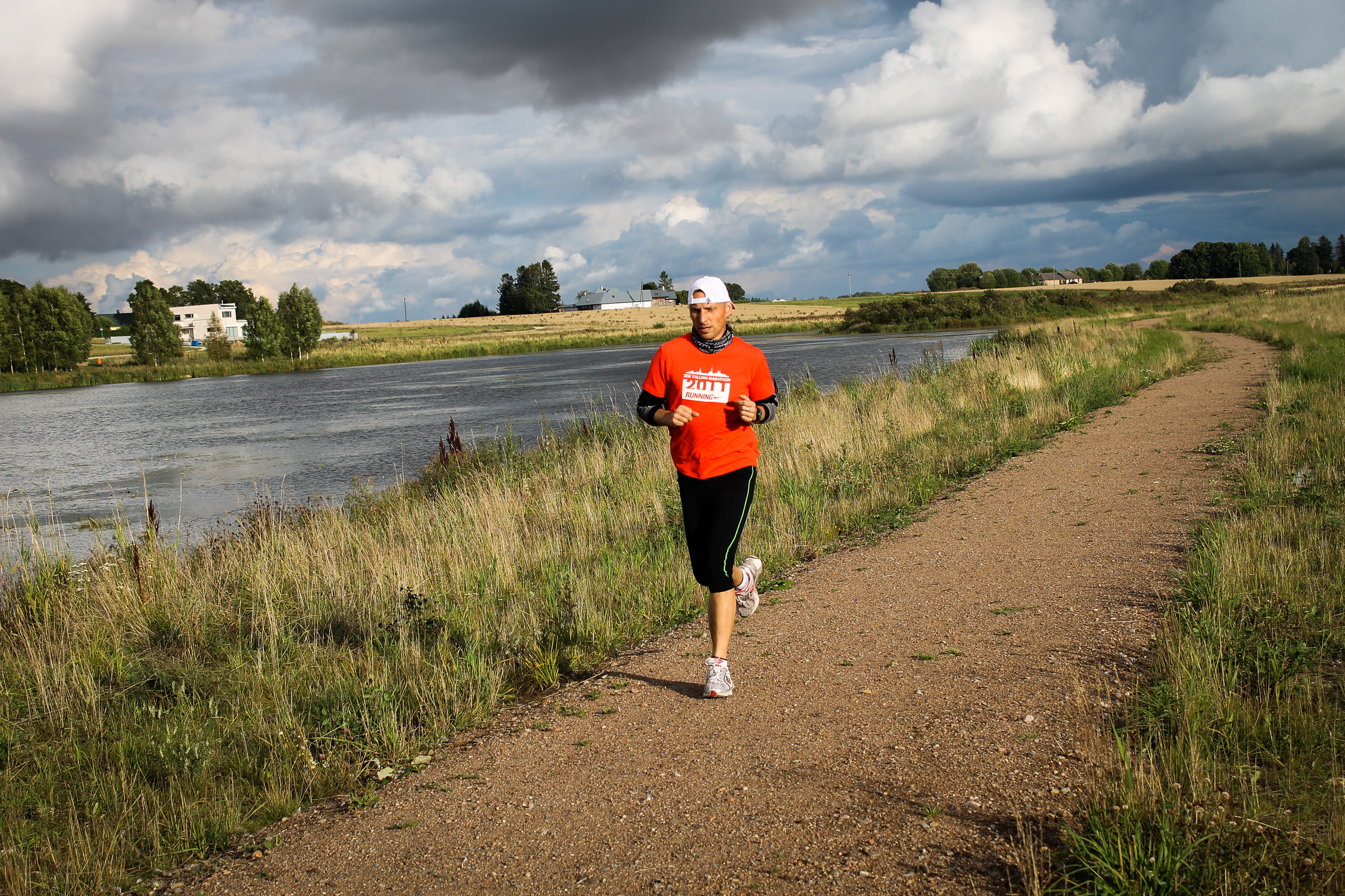 Kadrina paisjärv kuival suvel.